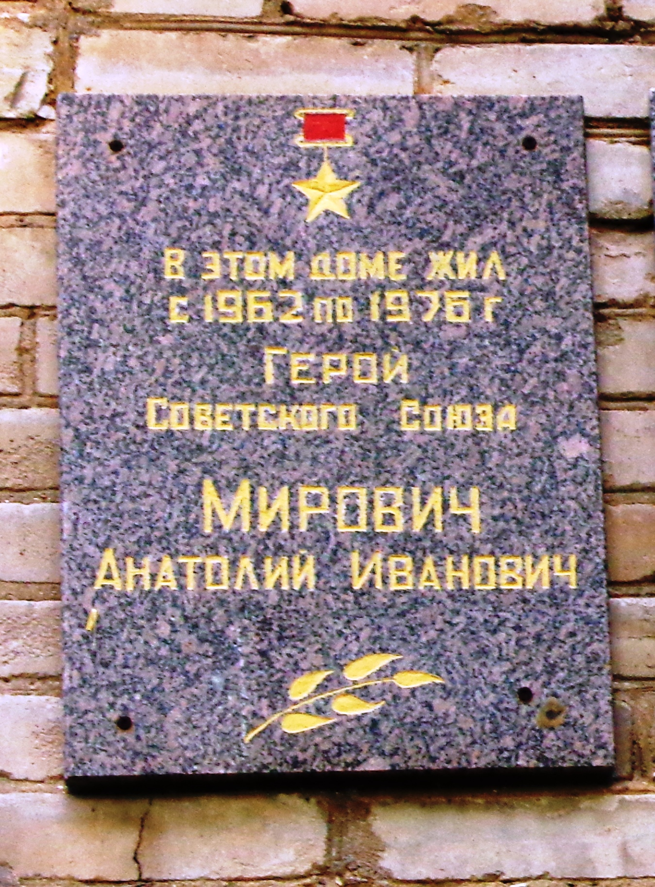 Мемориальная доска на доме № 7 по улице Авиационная в поселке Монино Мирович АИ